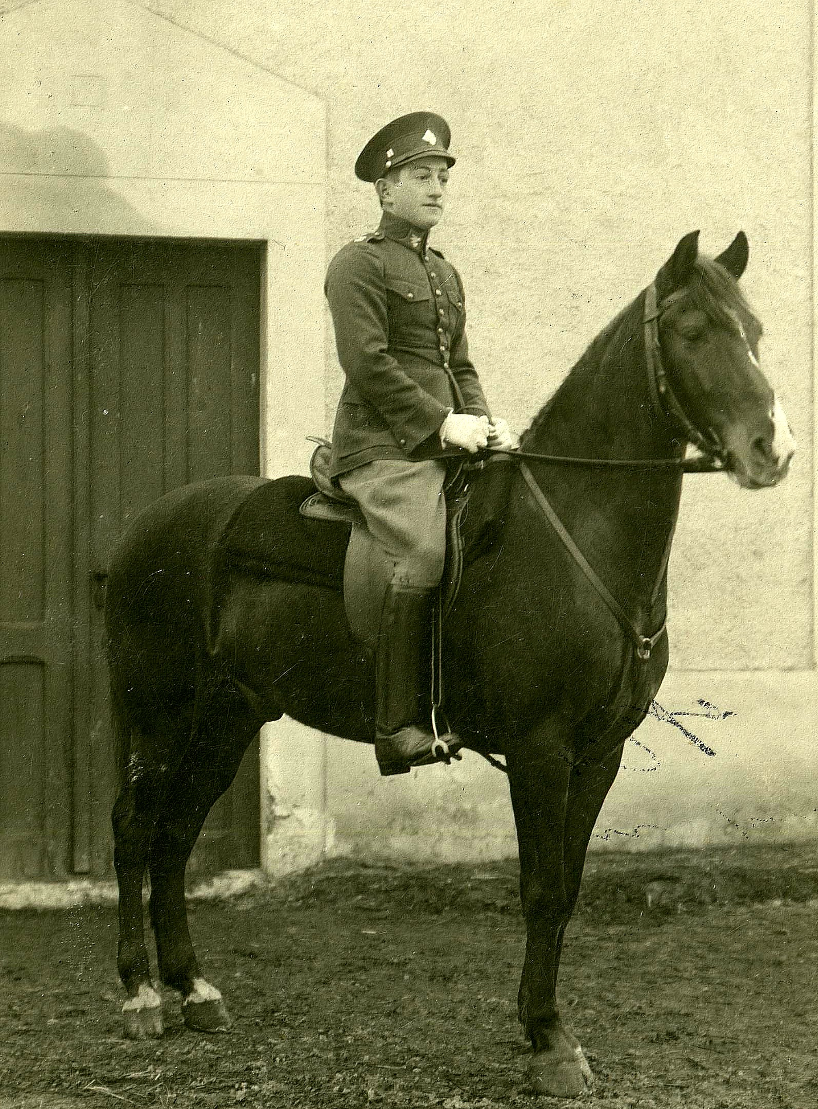 absolvenstské foto